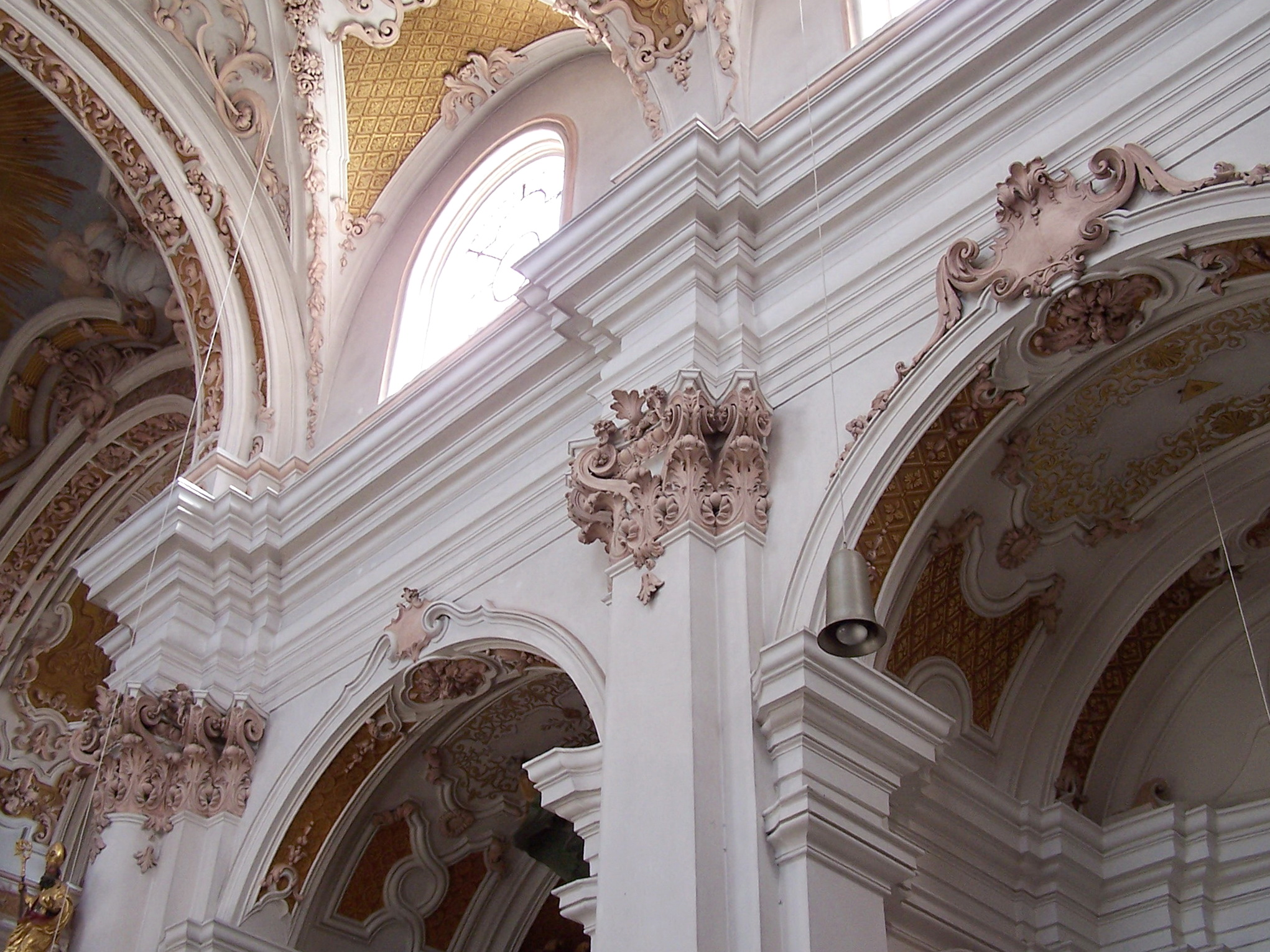 Rohr in Niederbayern. Abt-Dominik-Prokop-Platz 3. Katholische Pfarr- und Klosterkirche Mariä Himmelfahrt. Ehem. Augustinerchorherren-Stiftskirche, barocke Anlage mit Seitenkapellen und Querarmen, 1717–22 von Egid Quirin Asam erbaut. Mehrfach abgesetzte Simse über dern Quertonnen.